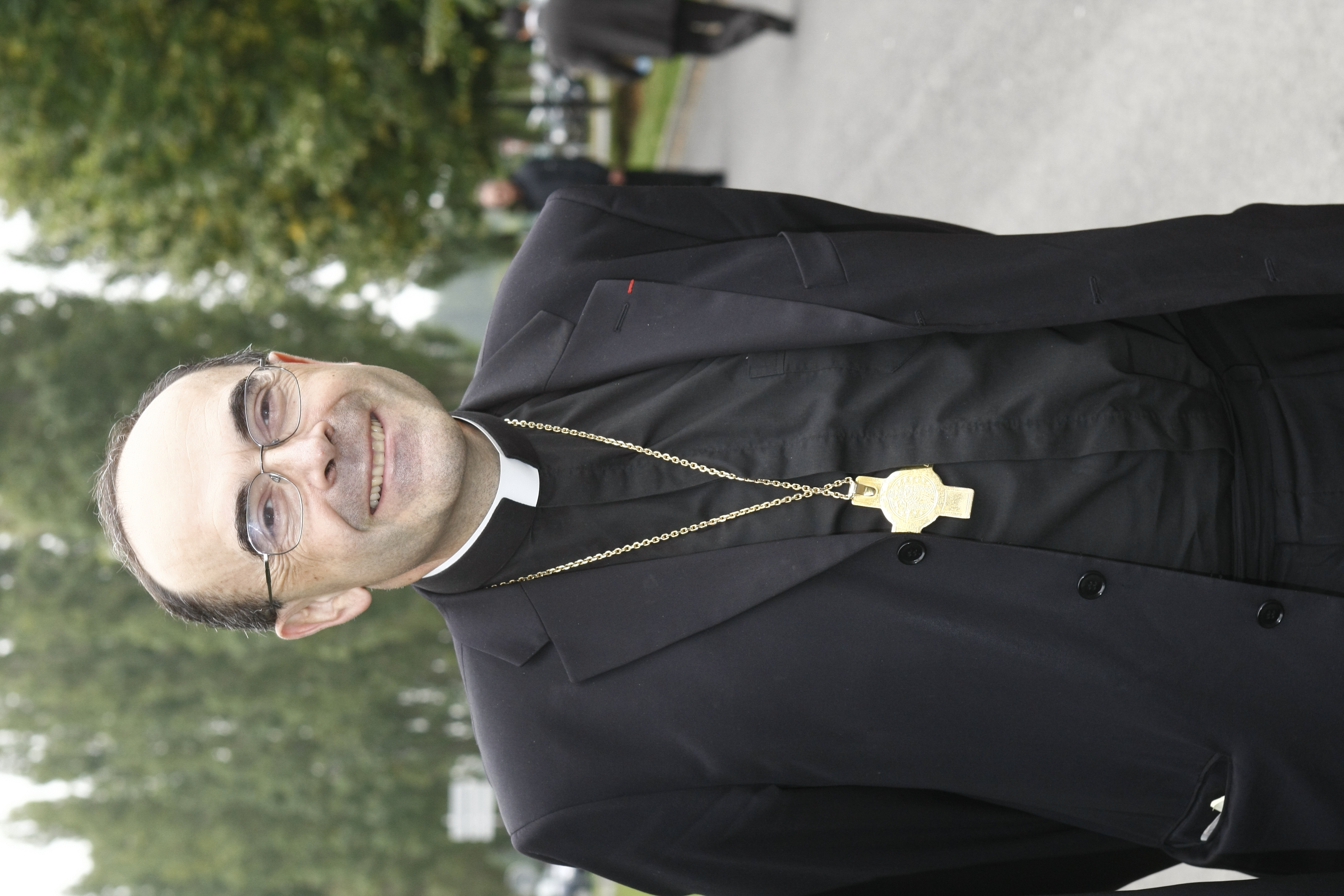 Cardinal Philippe Barbarin, Archevêque de Lyon